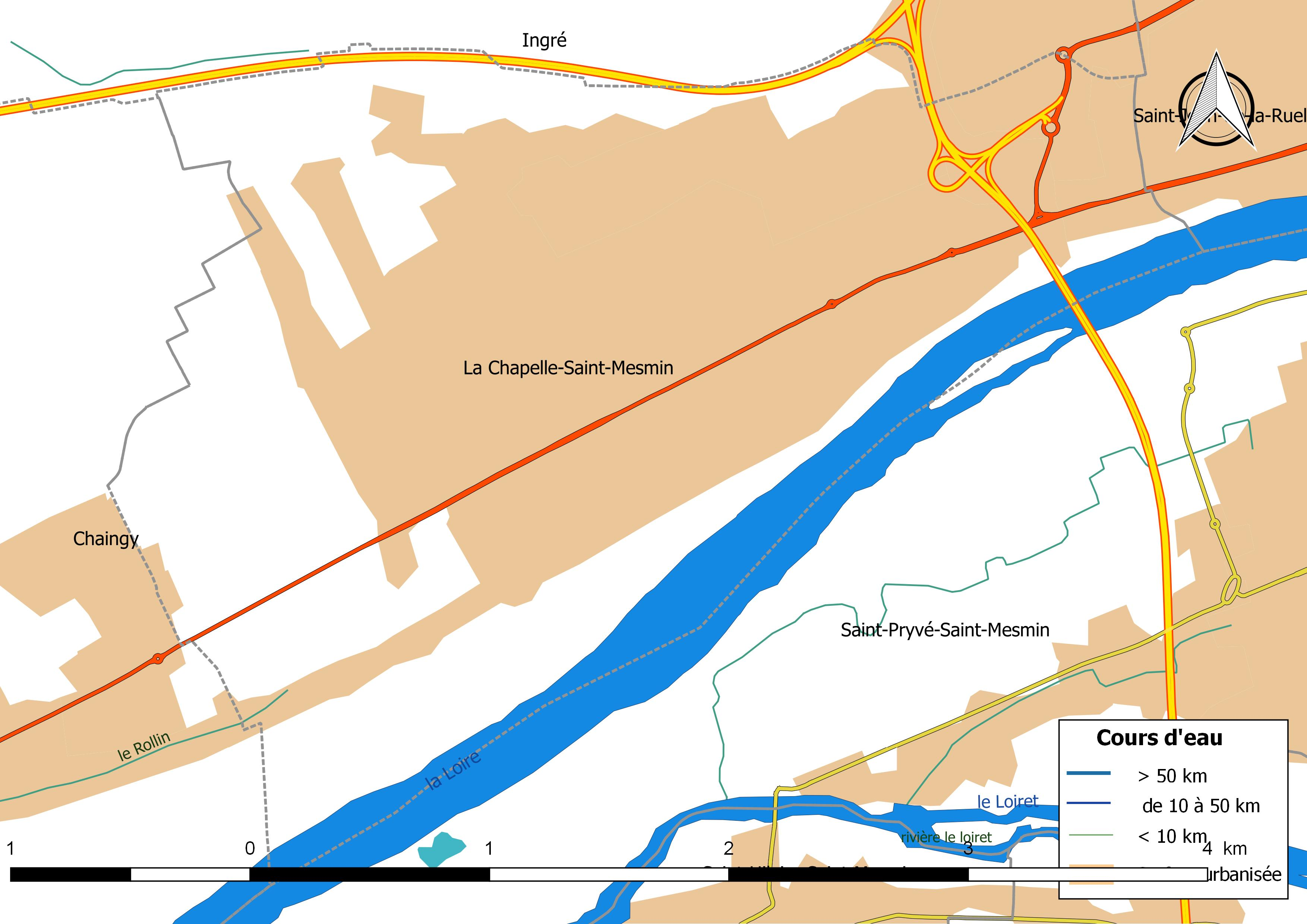 Carte du réseau hydrographique de la commune de La Chapelle-Saint-Mesmin (France).